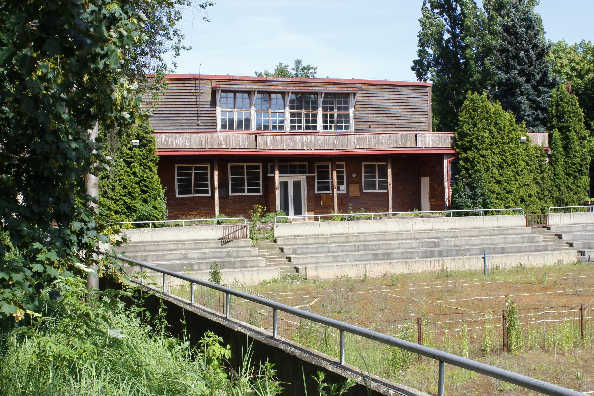 Bohumír Kozák: Klubovna LTC Praha, 1926